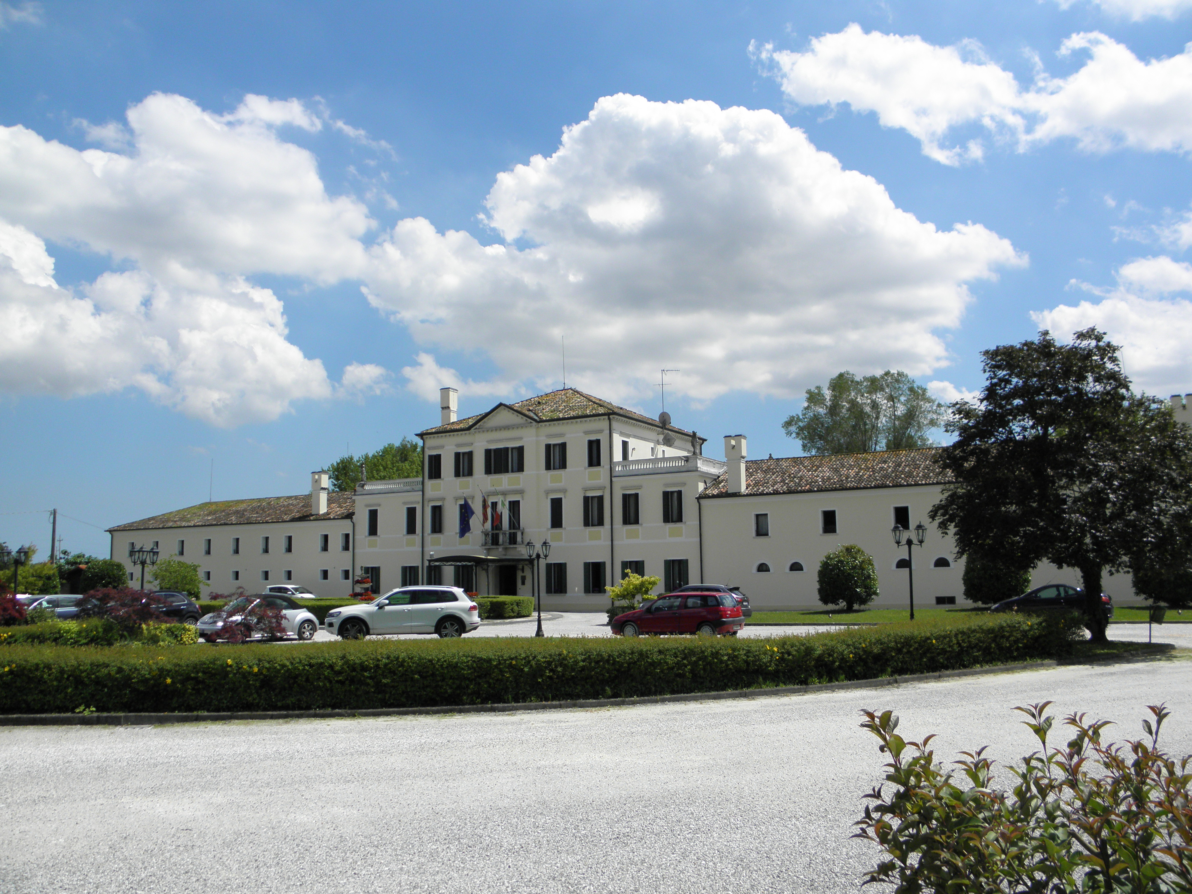 Zerman, frazione di Mogliano Veneto: Villa Braida (XIX secolo).